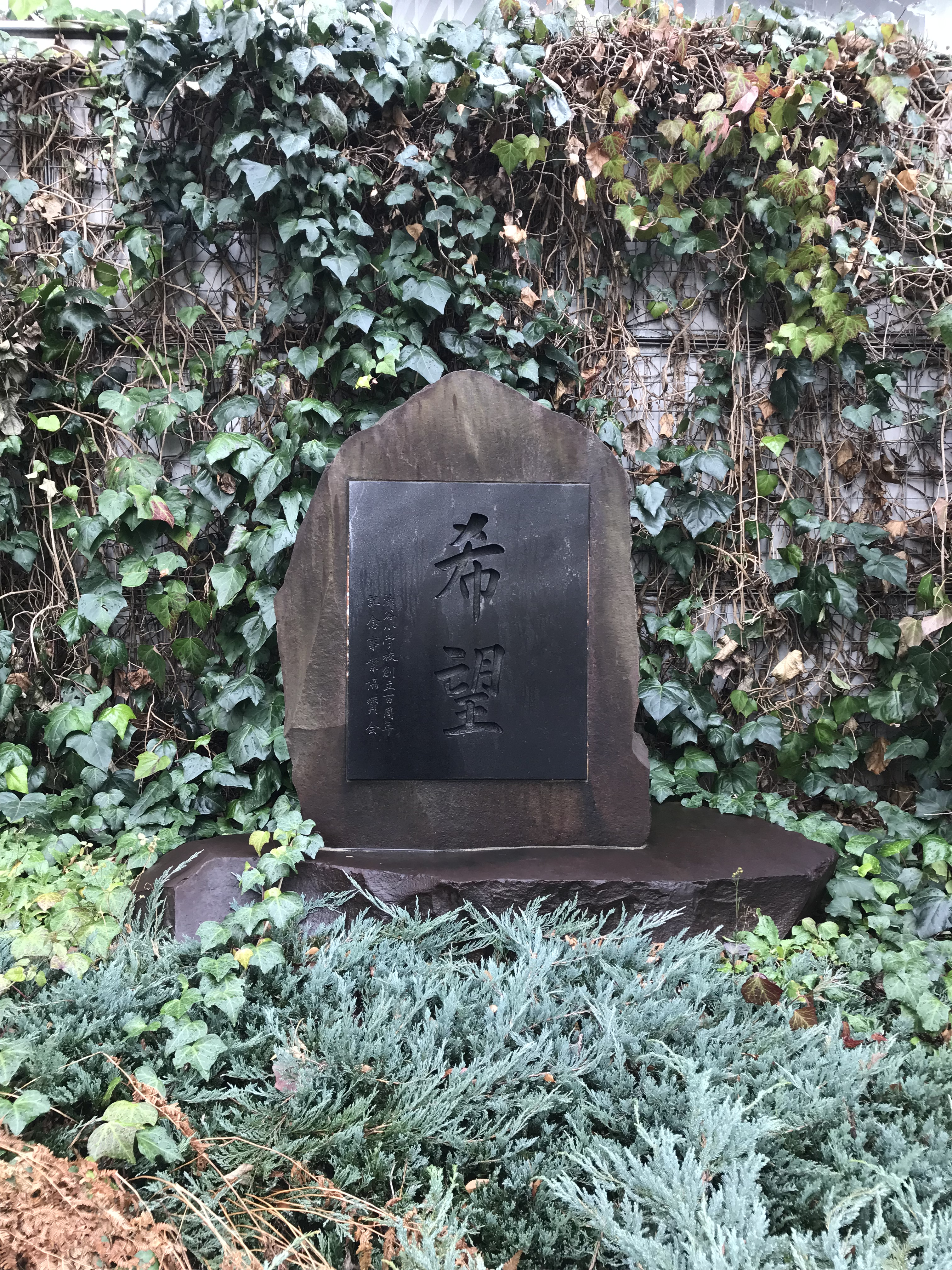 今も現地に残る渋谷小学校の記念碑